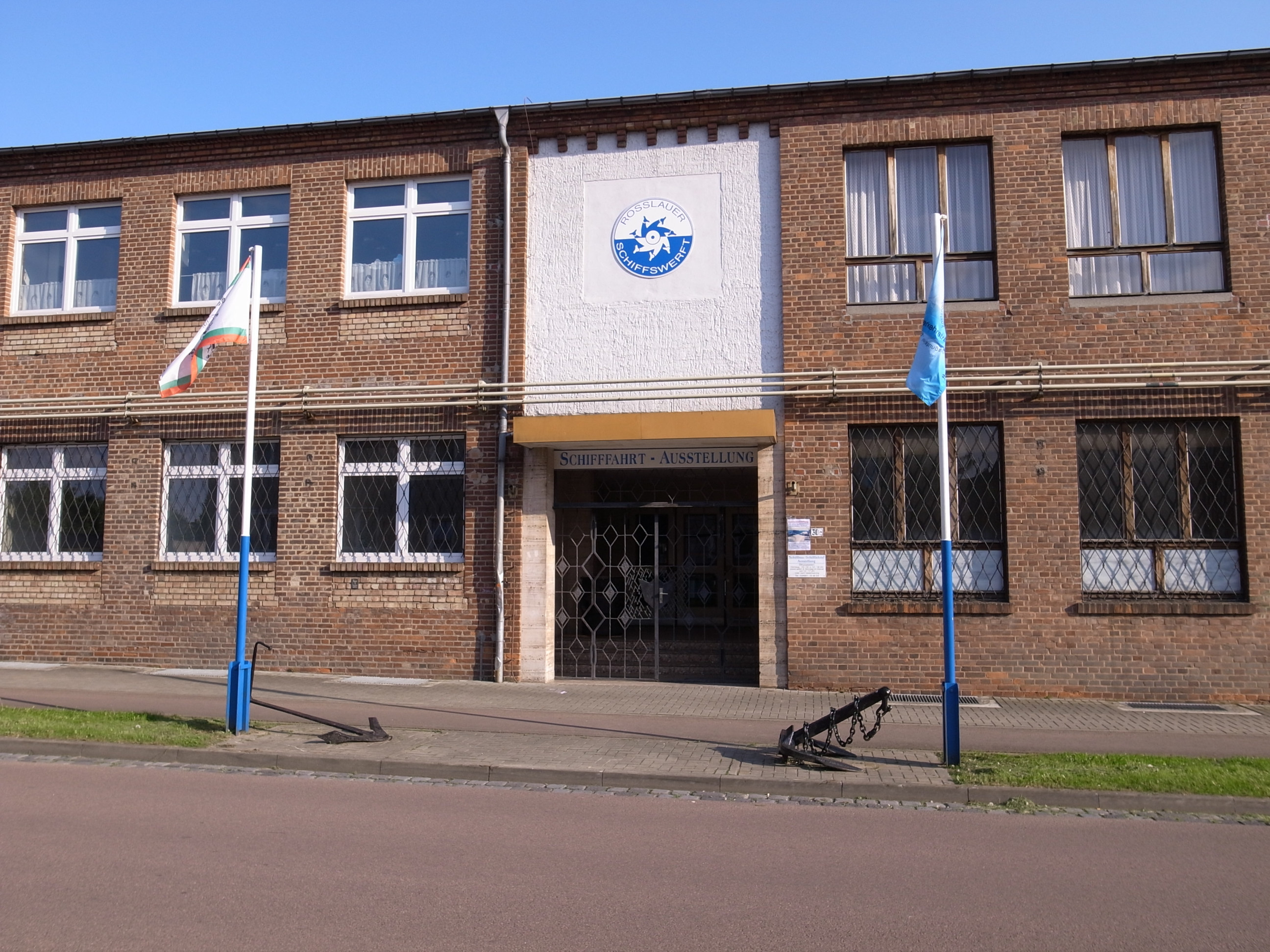 Roßlau, Schiffbau- und Schifffahrtsmuseum, Roßlauer Schifferverein 1847 e.V., Clara-Zetkin-Straße 30c